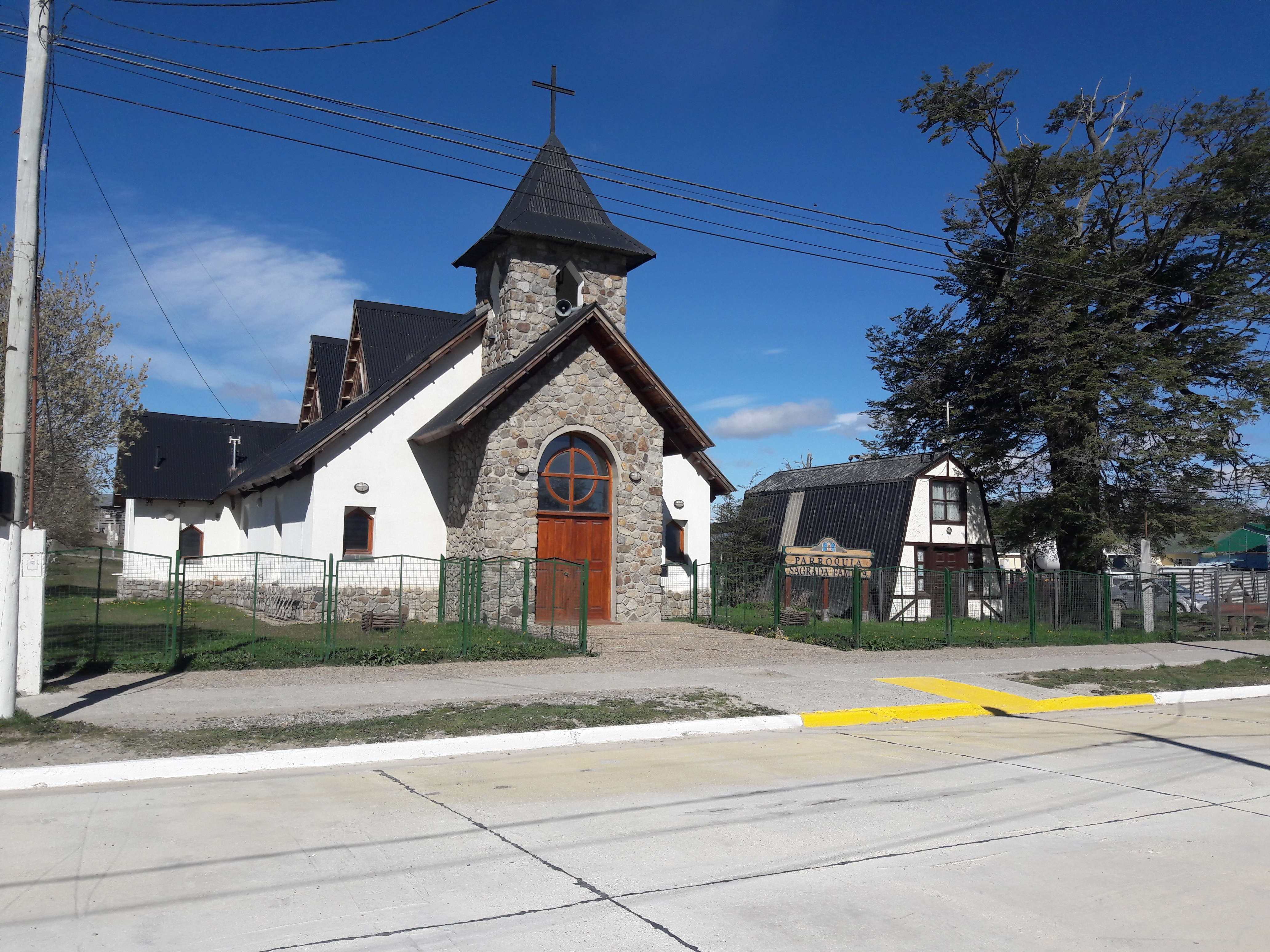 imagen de la Iglesia Sagrada Familia ubicada en el municipio de Tolhuin